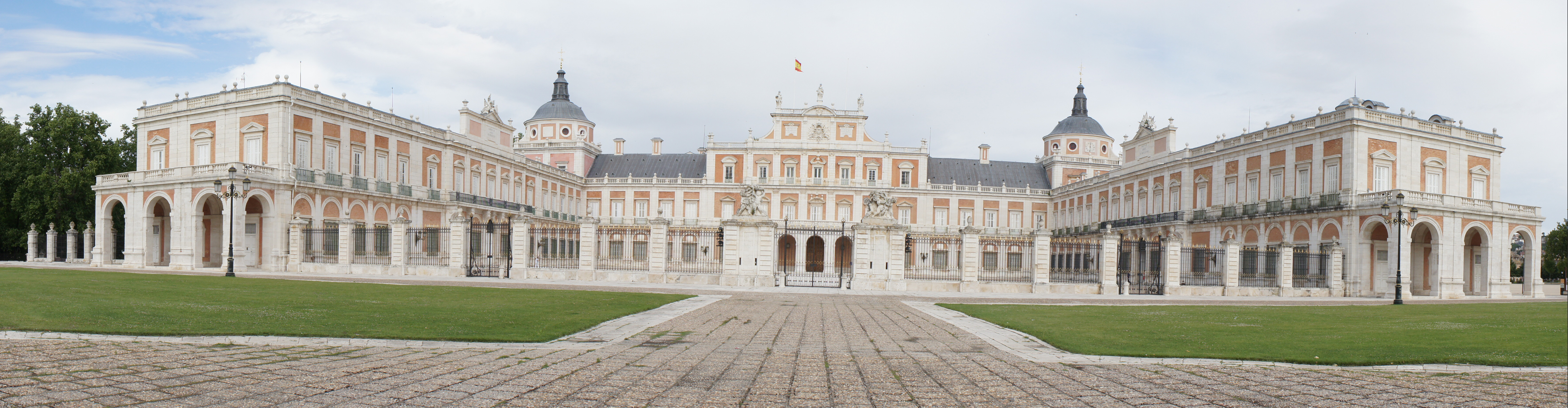 Fachada principal del Palacio de Aranjuez.